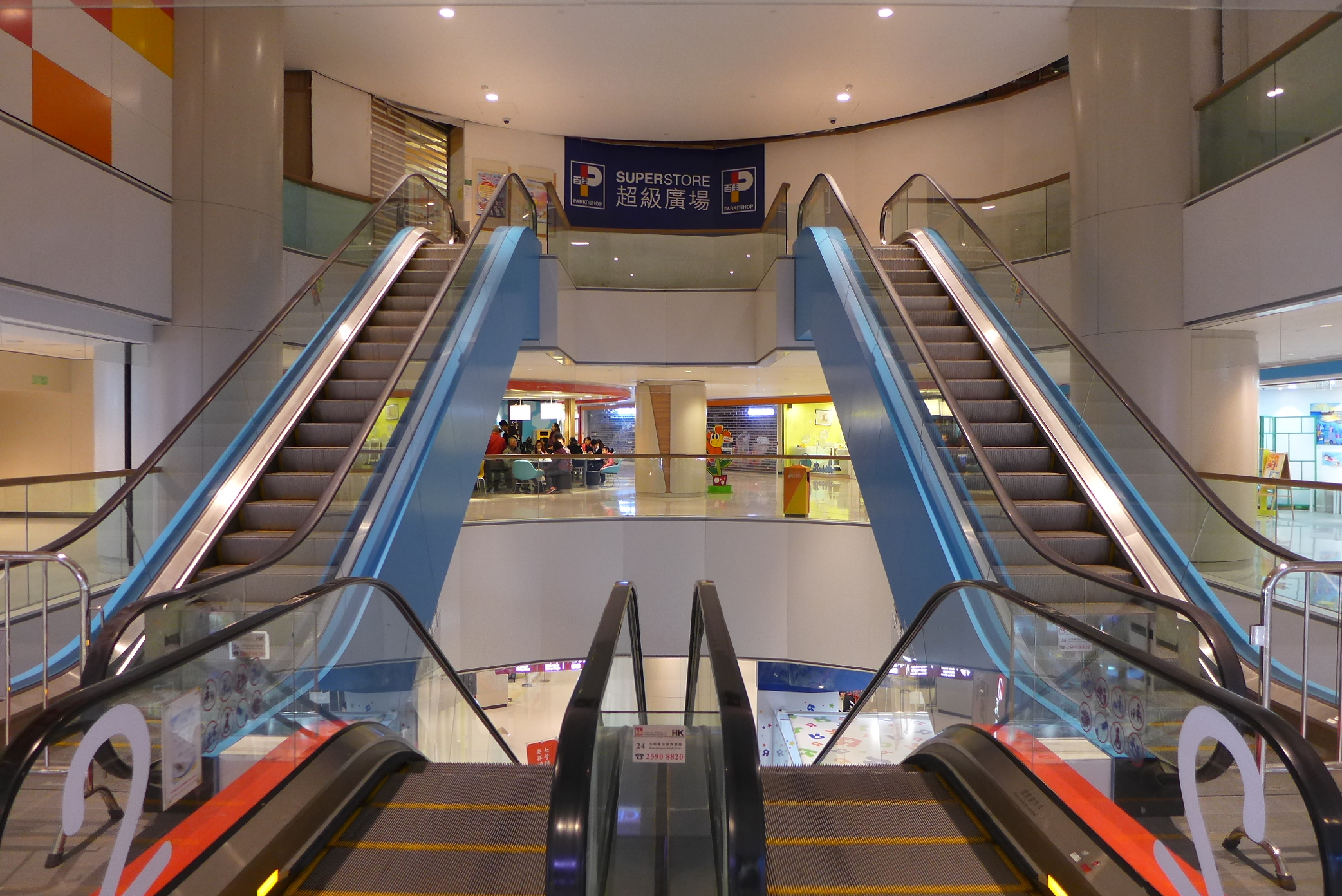 D Park Escalator